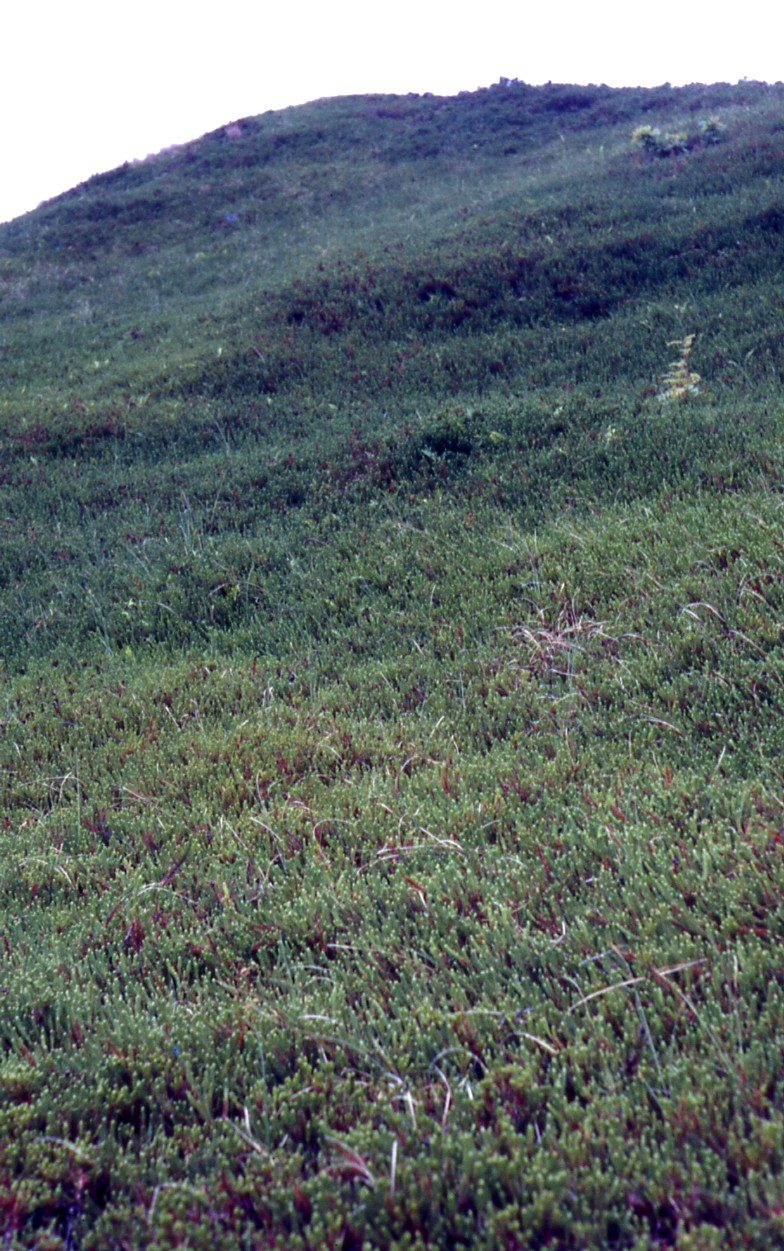 Braun- oder Tertiärdüne auf der Insel Spiekeroog mit teppichartigem Bewuchs von Krähenbeerheide (Empetrum nigrum).